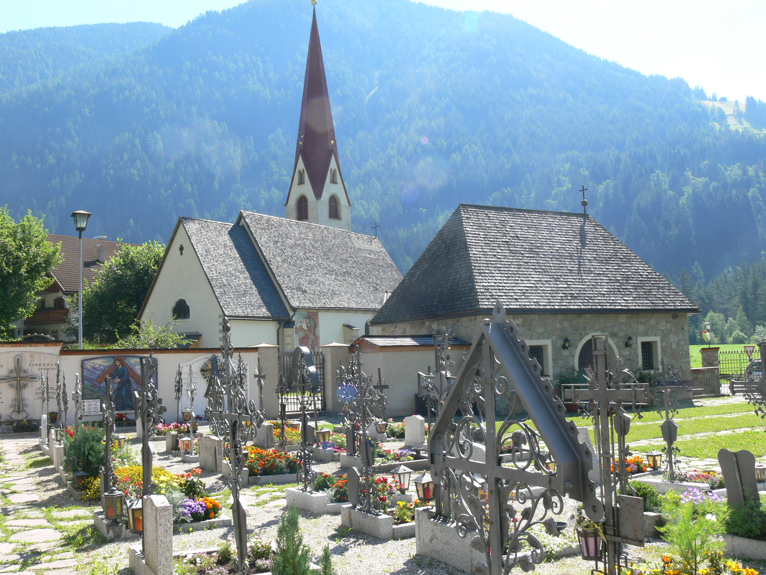 Antholz-Niedertal ( Anterselva di sotto ). Cemetery and church St. Walburga